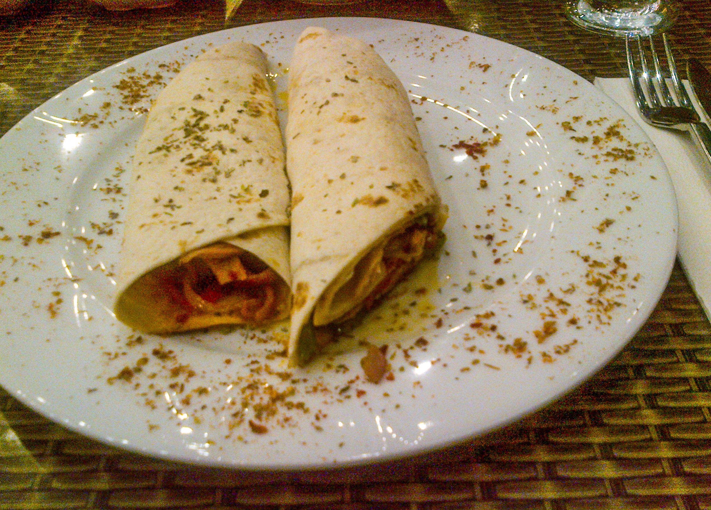 Kokorech wrap (dürüm) from the Turkish cuisine, in Istanbul.